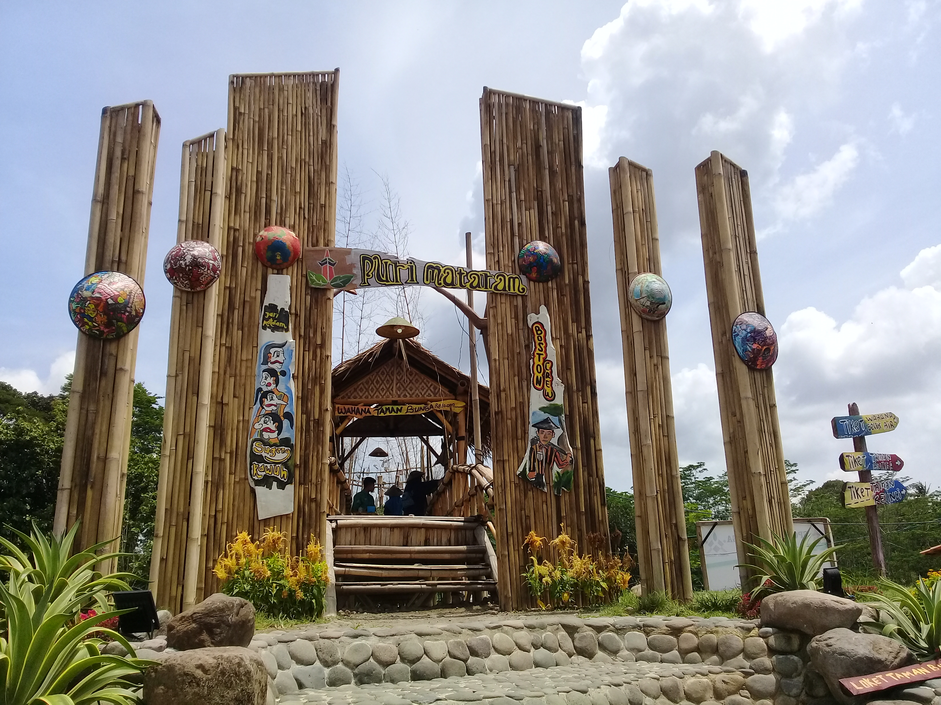 Pintu masuk taman bunga di PurI Mataram